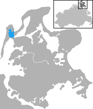 Mecklenburg-Vorpommern, Vitter Bodden Bay, near Hiddensee (marked blue)